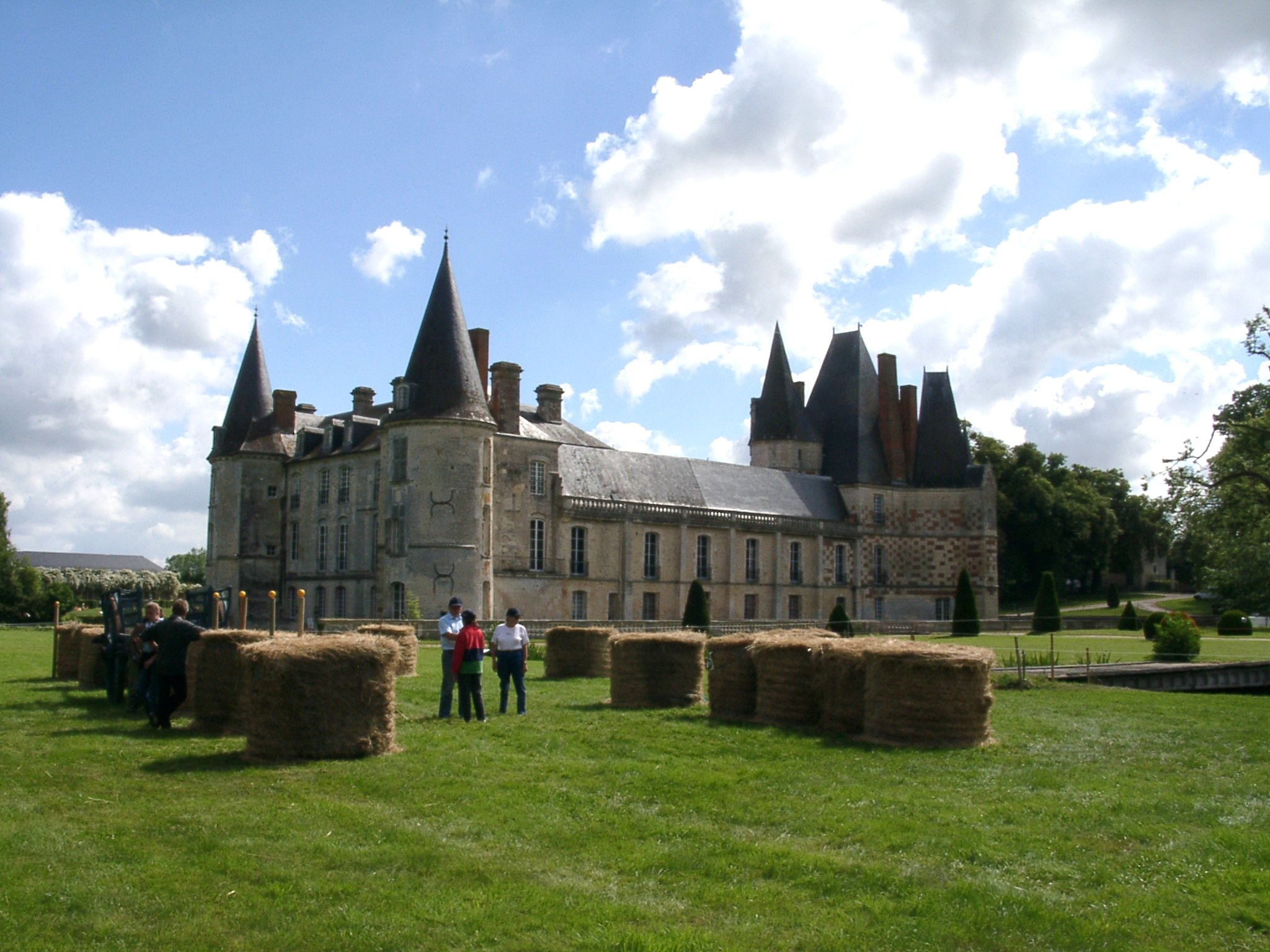 16e s.